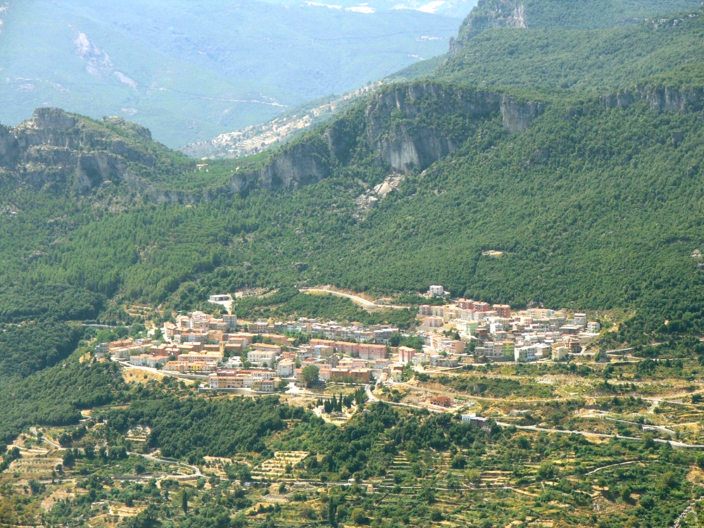 Osini